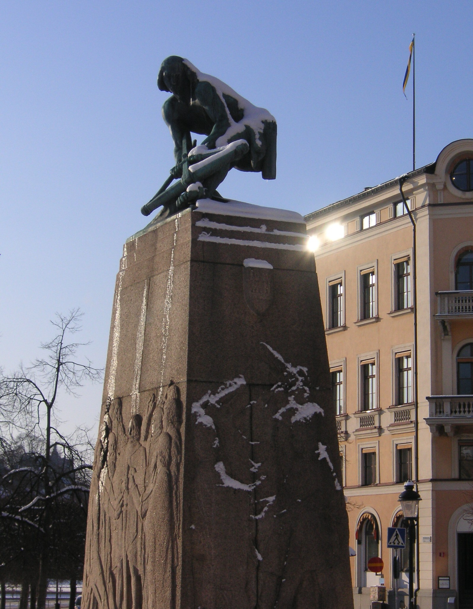 "Bågspännaren" av Christian Eriksson, Kornhamns torg, Stockholm